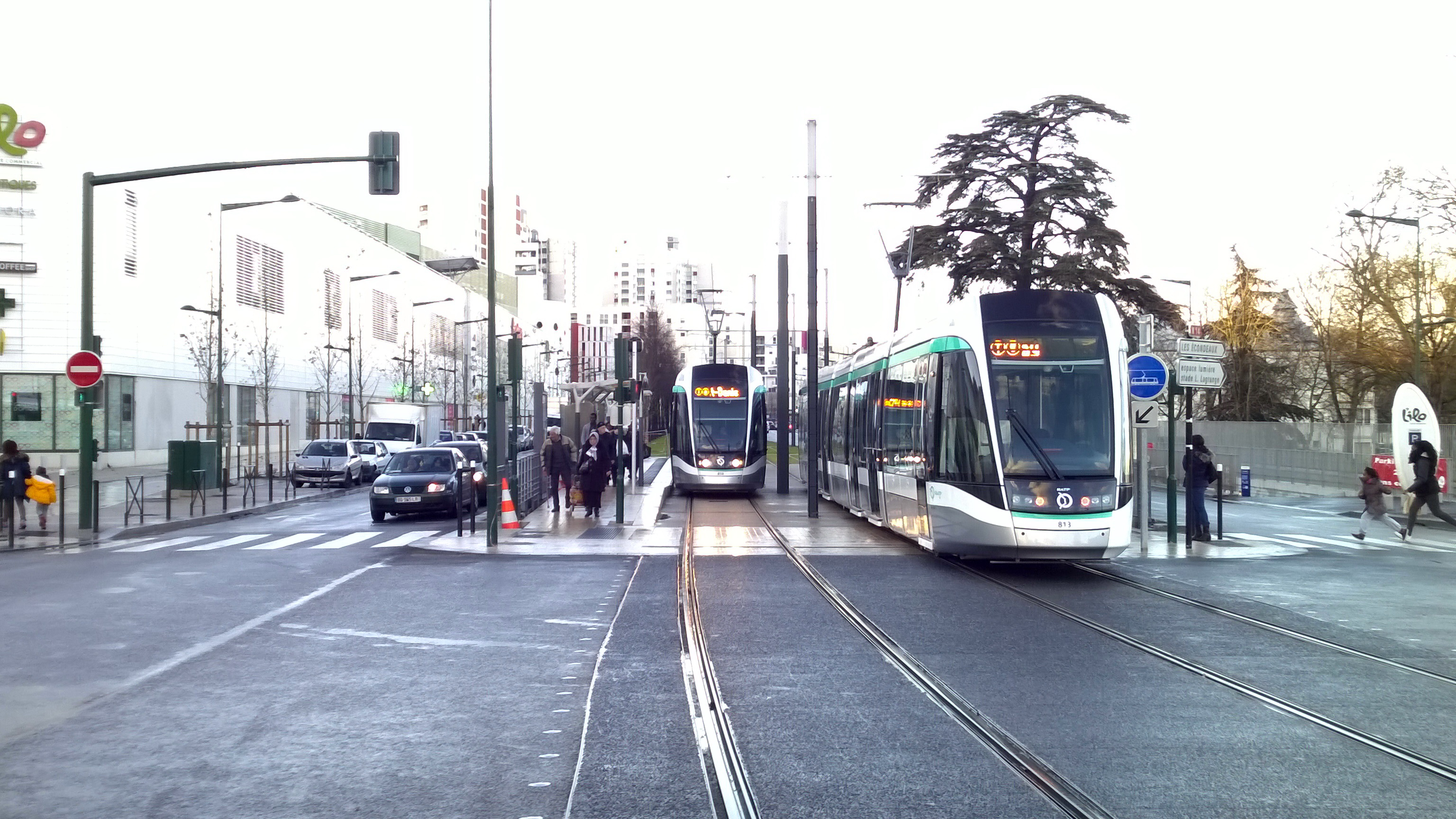 Carrefour Salvador Allende à Epinay-sur-Seine : la station Rose Bertin du tramway T8 sur la RN14,le long du centre commercial Ilo, conçu par les architectes Conçu par le cabinet d’architectes Valode & Pistre et inauguré le 27 novembre 2013.